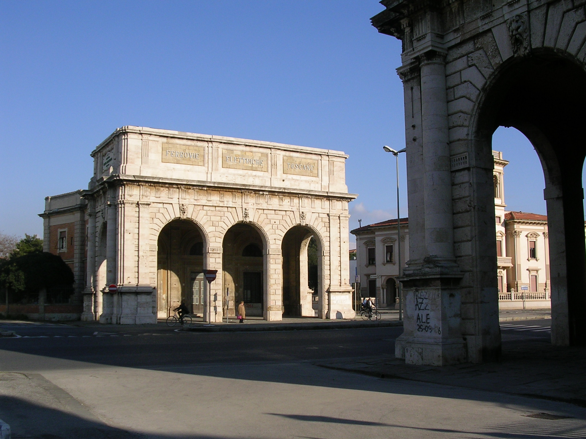 Livorno: la Barriera Margherita, facente parte della cinta doganale di fine Ottocento. Successivamente un edificio fu utilizzato come stazione capolinea della ferrovia Pisa-Tirrenia-Livorno.